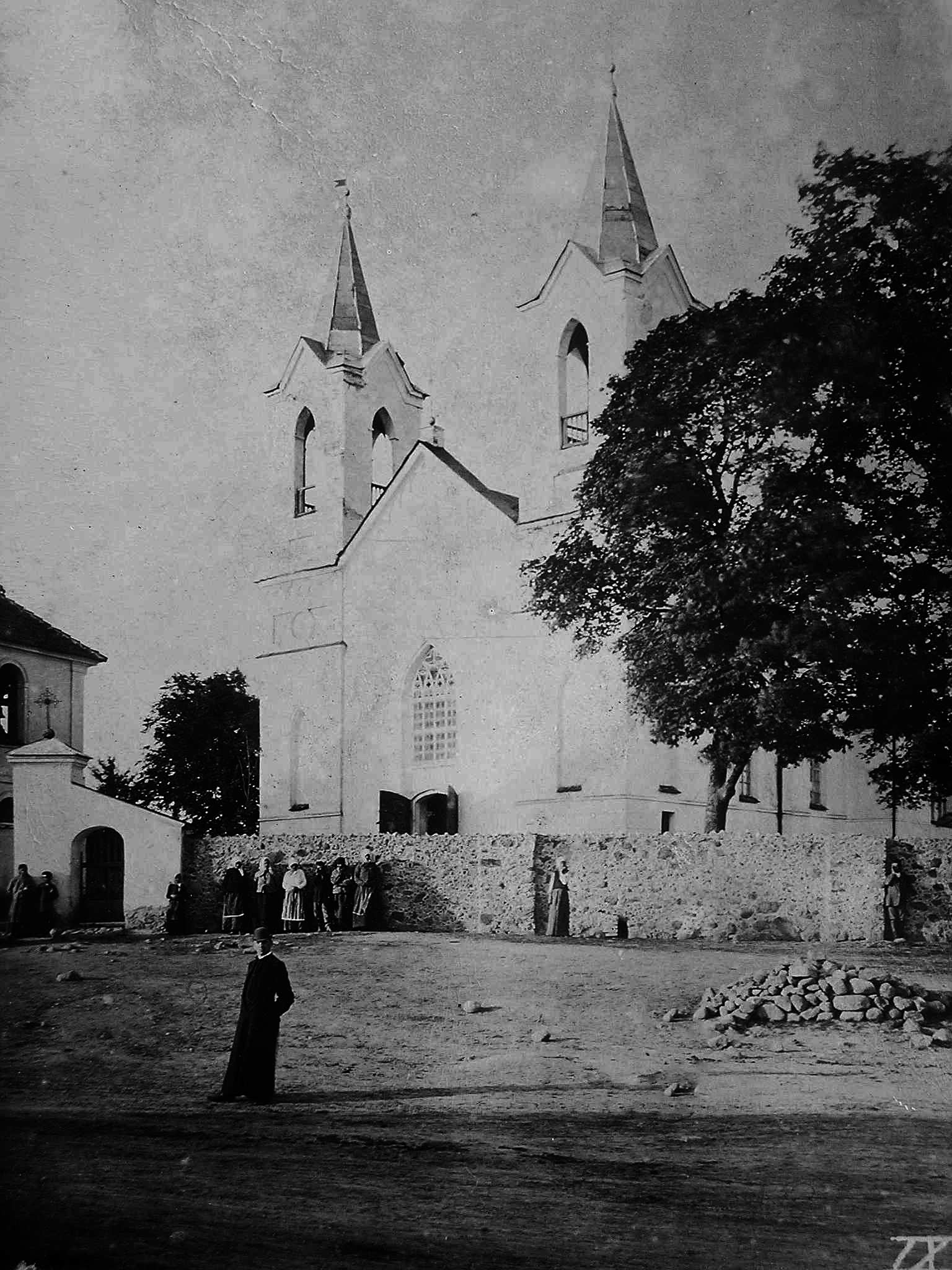 Беларуская (тарашкевіца): Новы Двор (Novy Dvor). Новы касьцёл